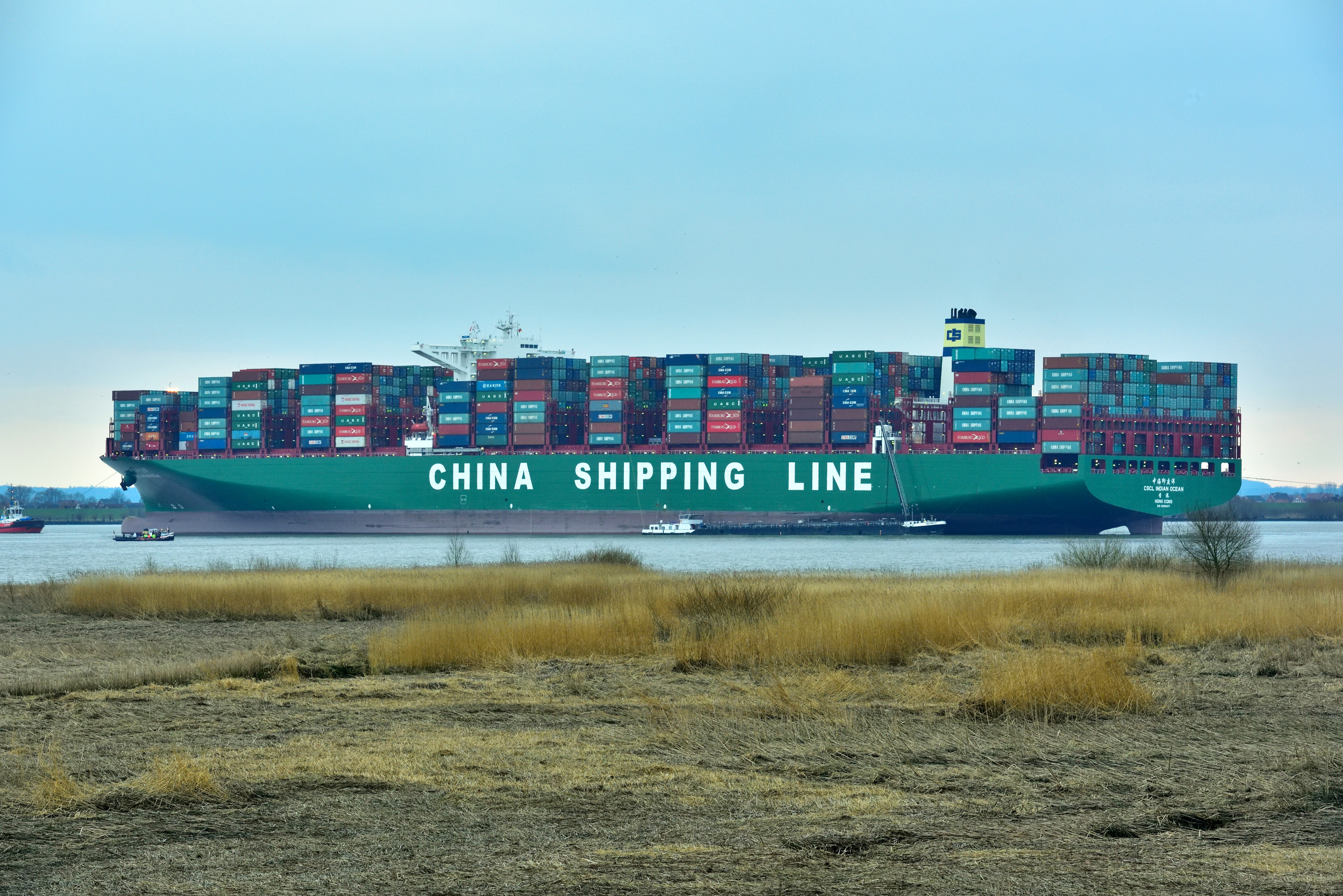 Die auf Grund gelaufende CSCL Indian Ocean in der Elbe vor Hetlingen